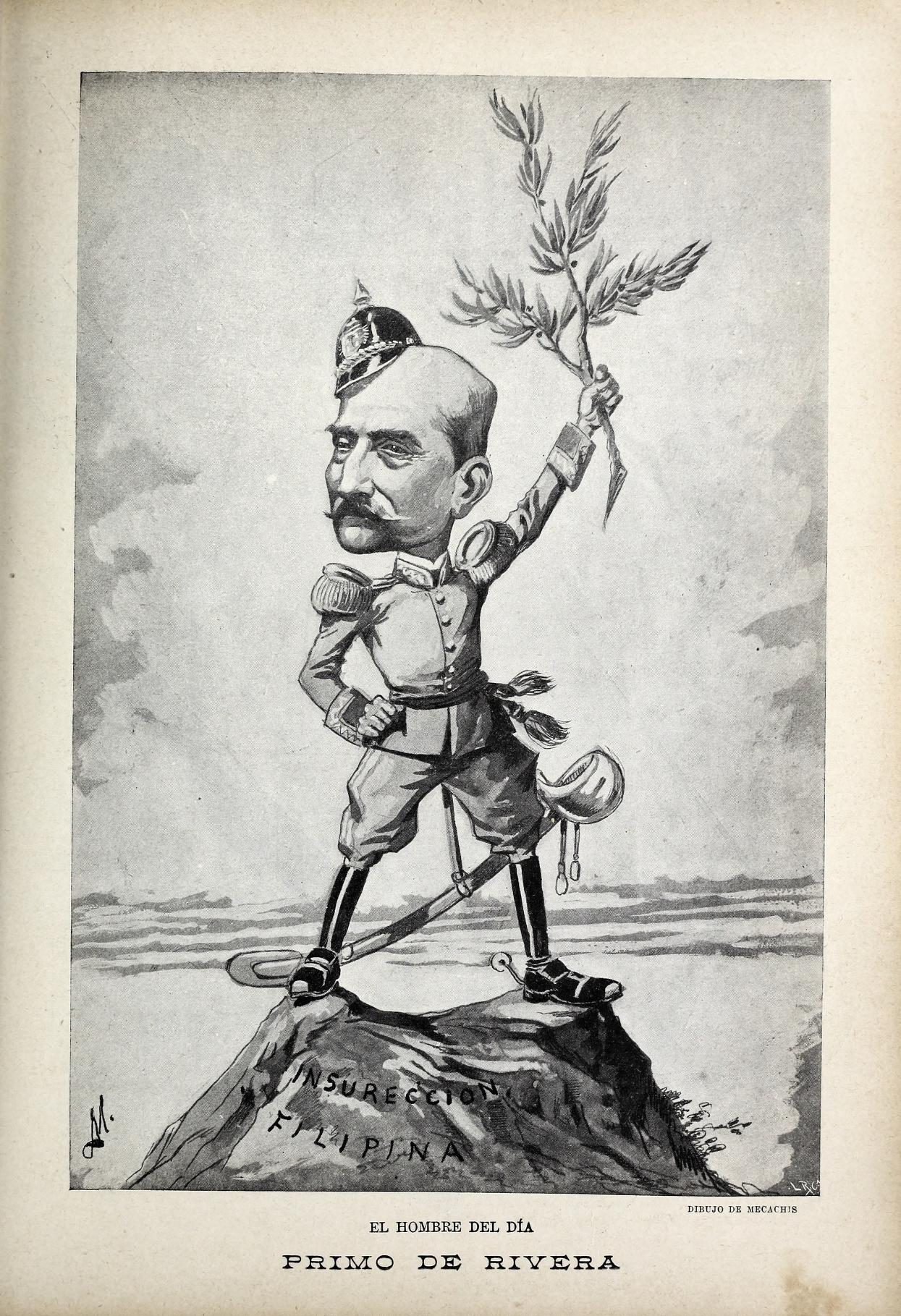 El hombre del día. Primo de Rivera.